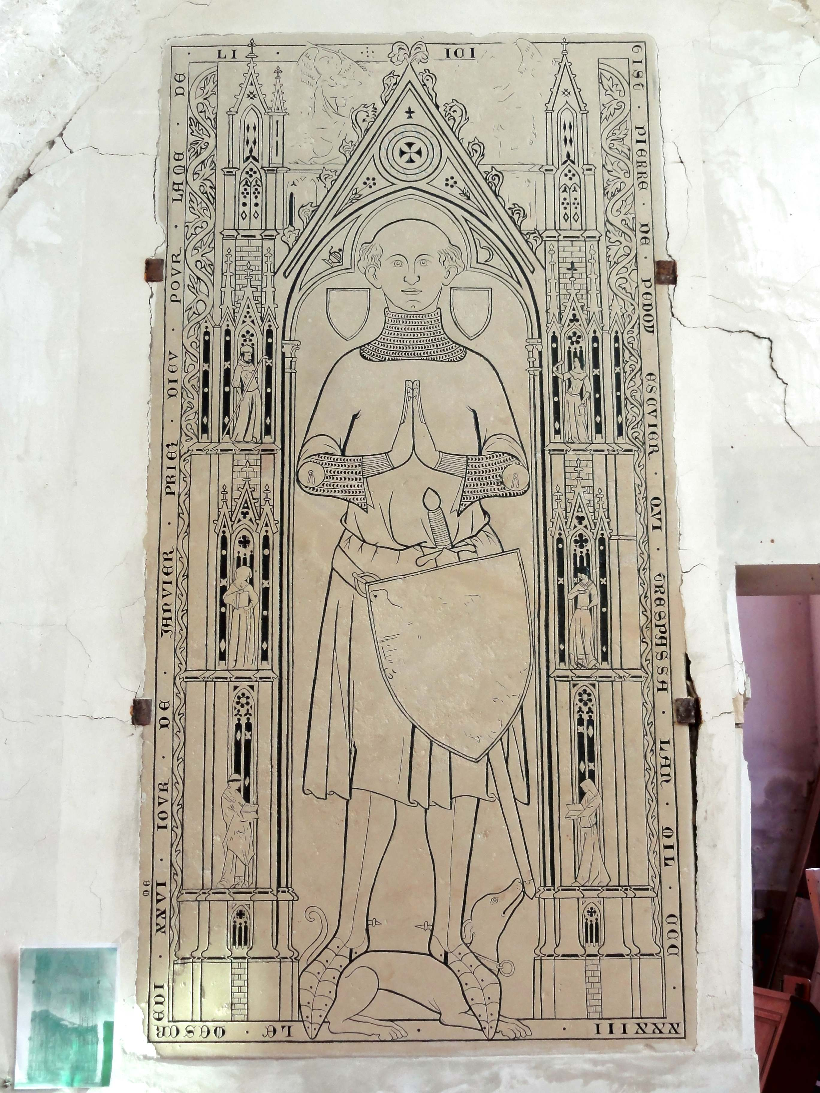 Mobilier de l'église - voir titre.